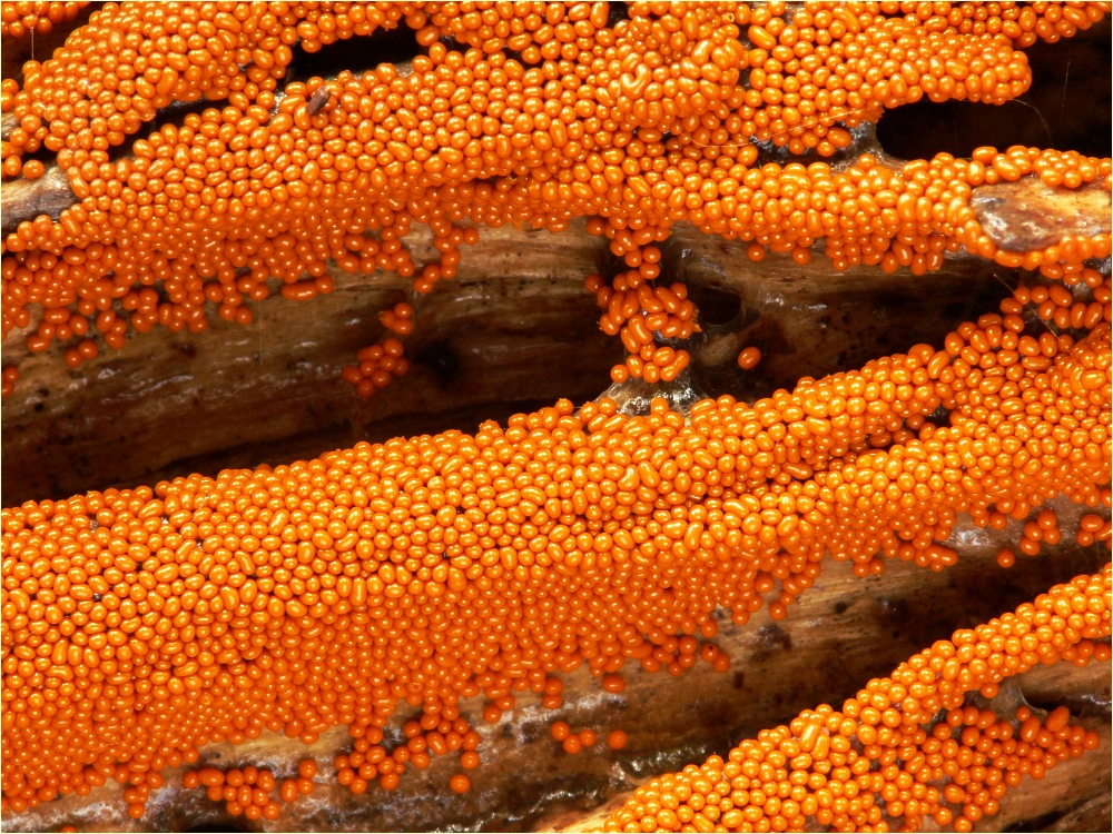 Schleimpilz (Trichia varia) im Urwald Sababurg